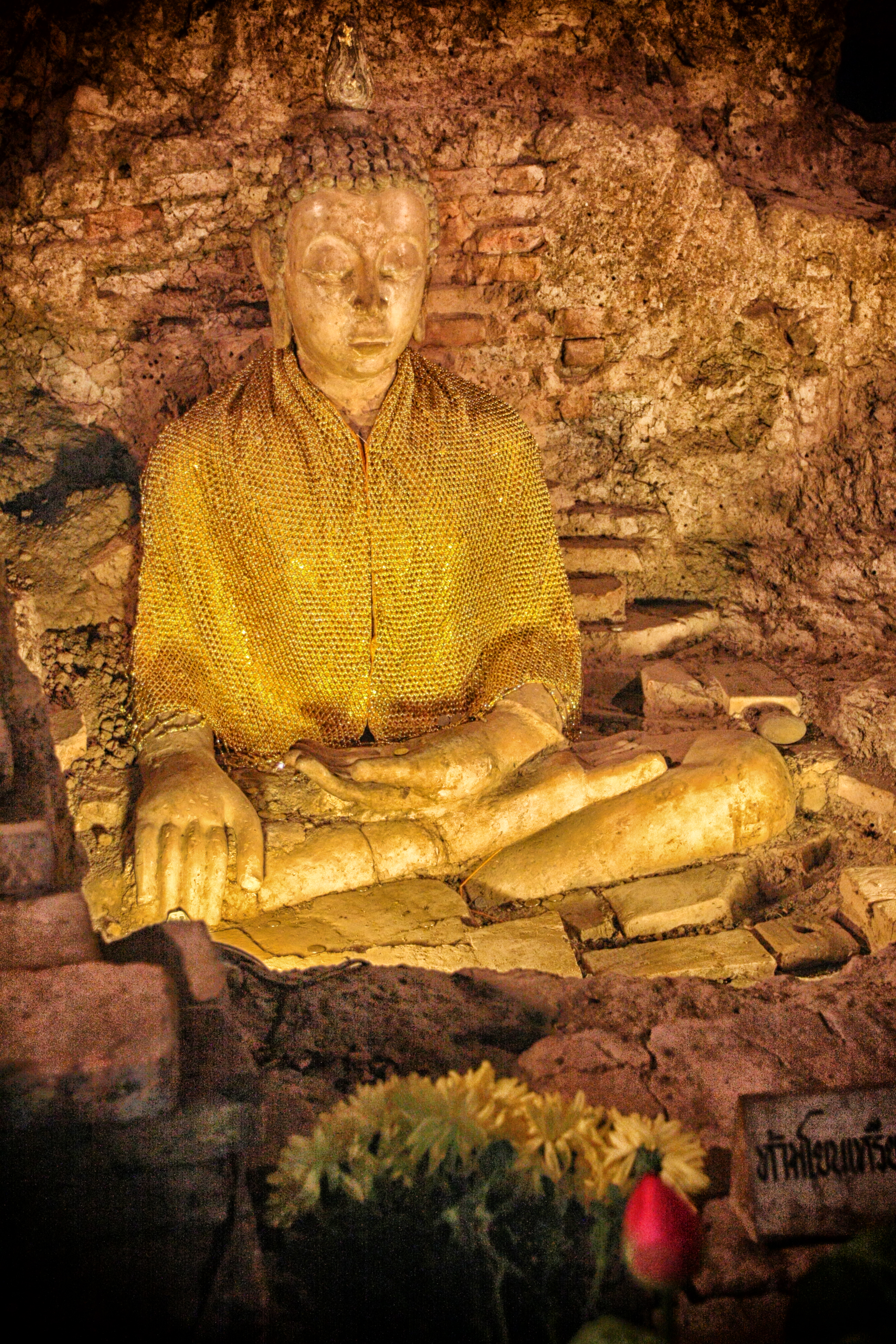 วัดพระธาตุผาเงา